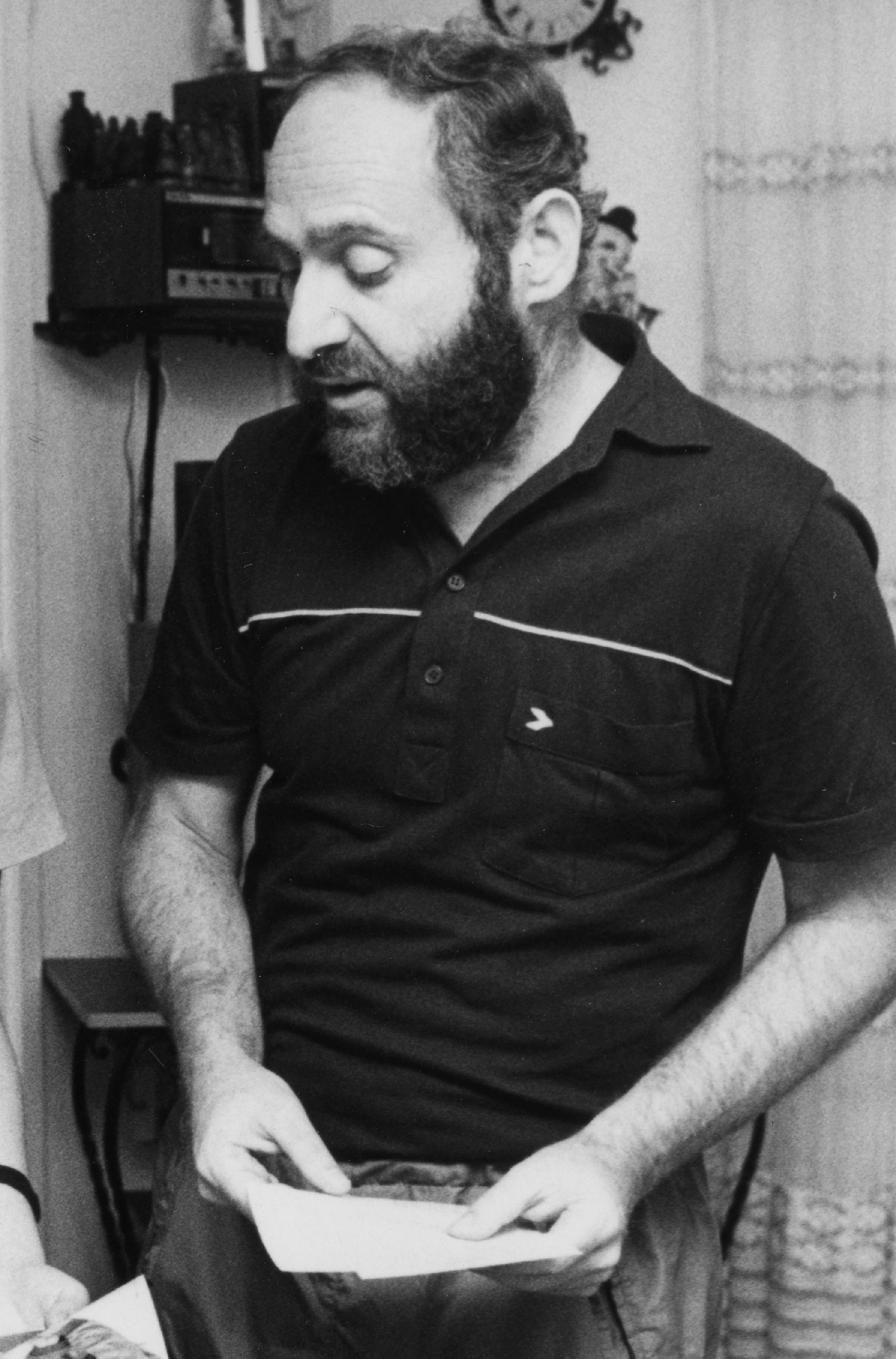 A Polgár lányok: Judit, Zsuzsa, Zsófia és édesapjuk, Polgár László.